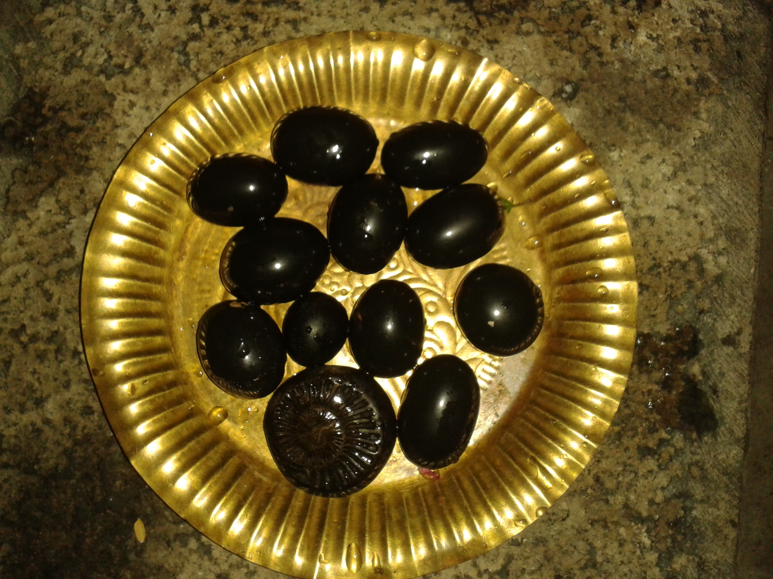 സാളഗ്രാമം